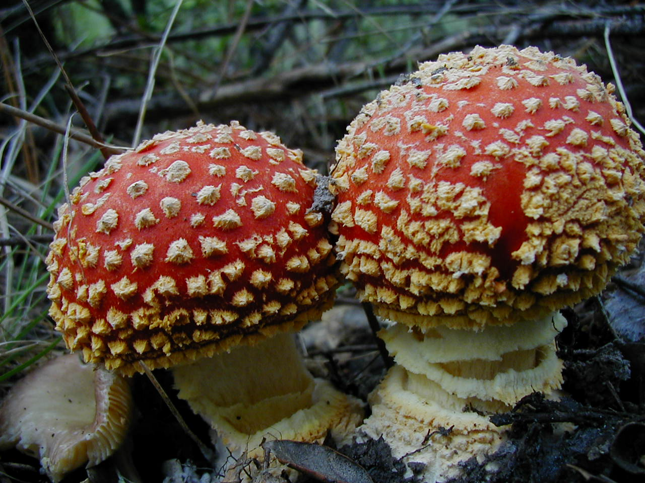 Dos Amanitas Muscarias